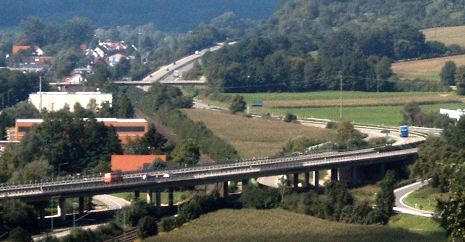 Bundesstraße 29 bei Lorch-Waldhausen, Brücke über die Remsbahn, Anschlussstelle Lorch-West